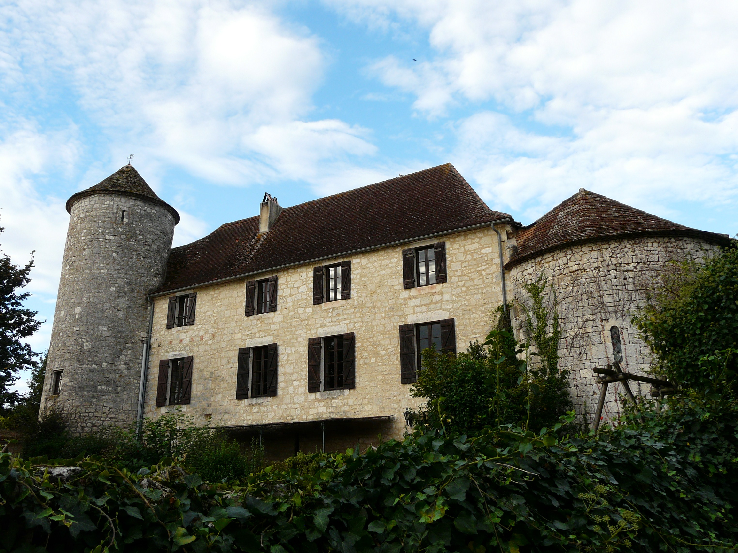 Le château de Sadillac, Dordogne, France.